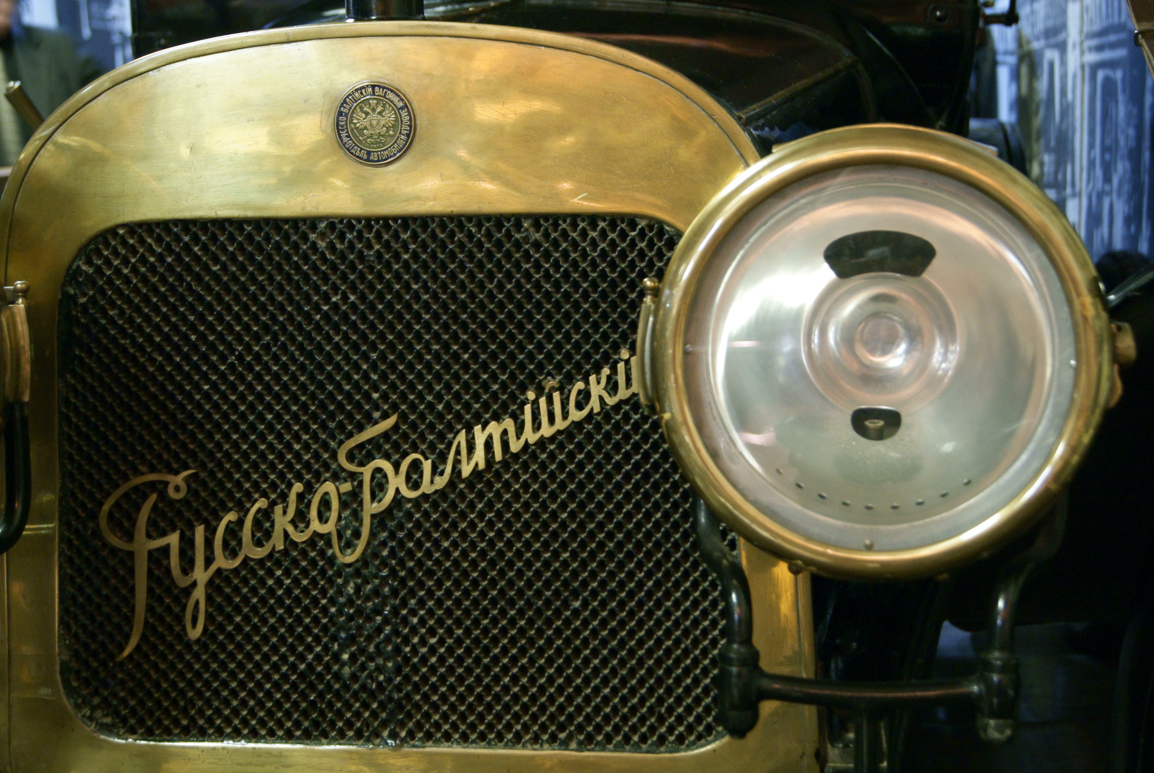 Russo-Balt